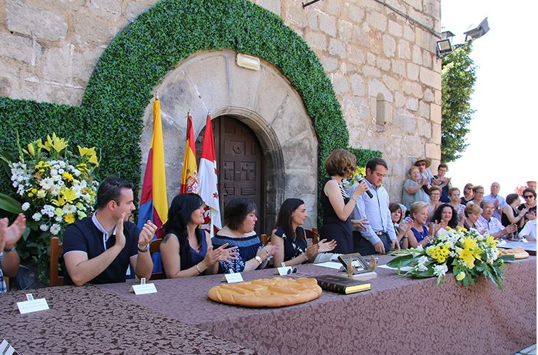 Foto hermanamiento